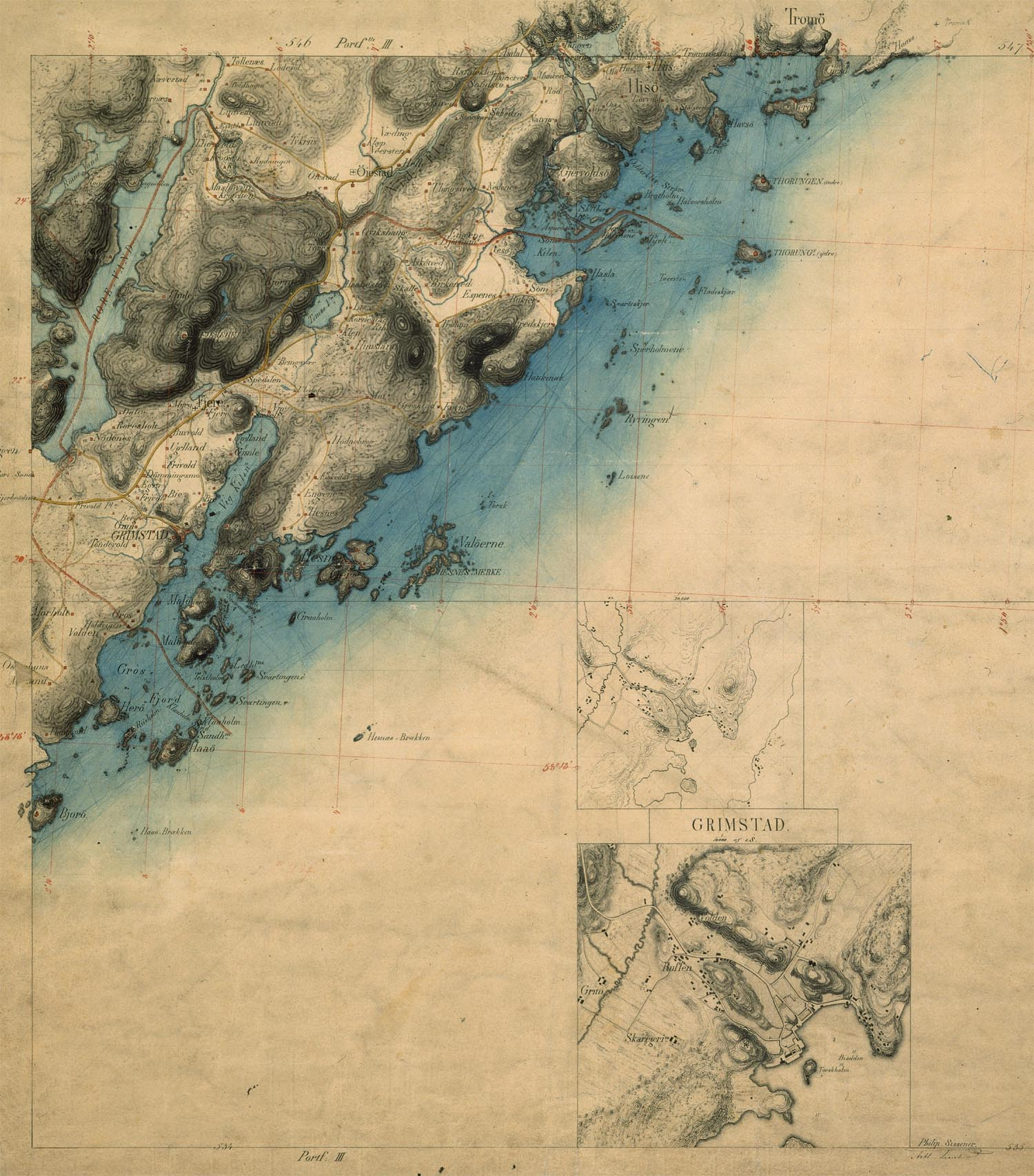 Kvartmilkart fra 1850 (Grimstad øst)